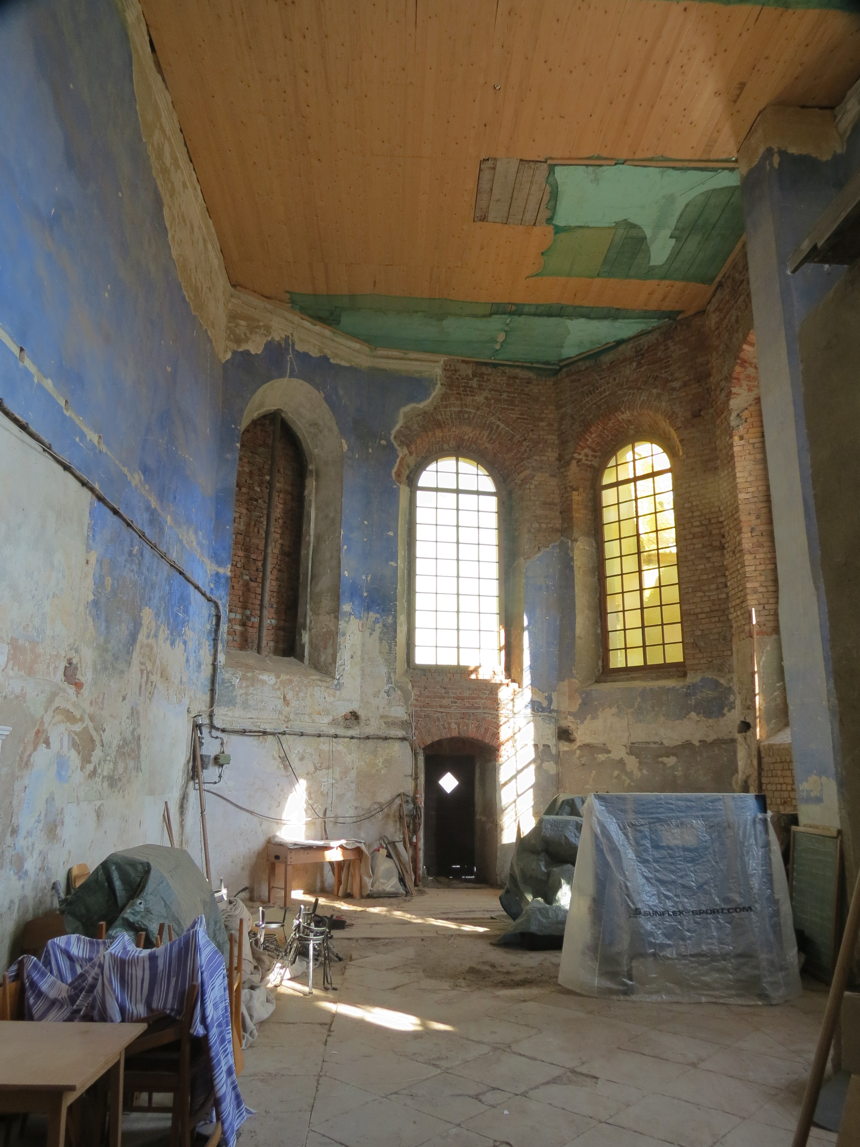 Stadtkirche Mutzschen, Innenraum des durch Mauer vom Schiff abgetrennten Chor, Blick nach Osten